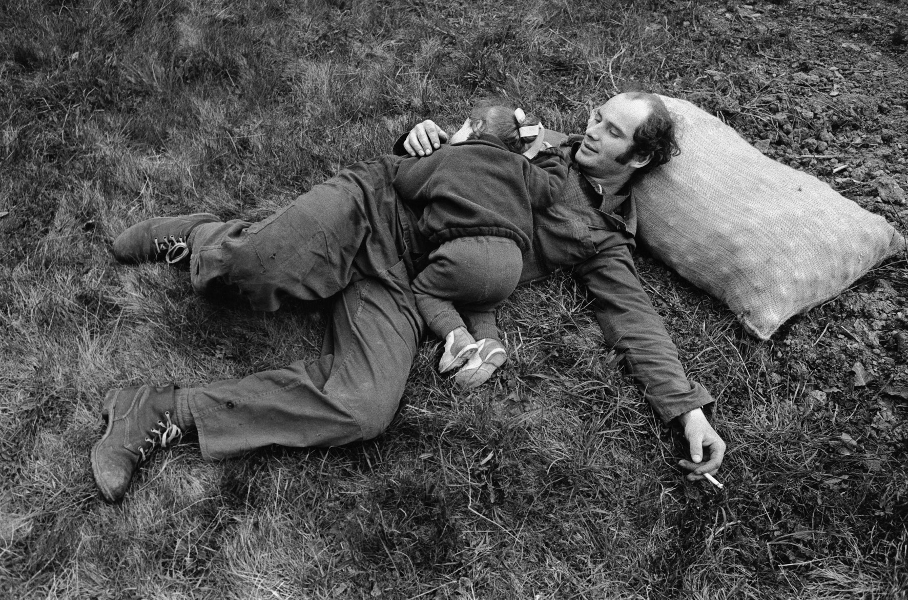 Jindřich Štreit´s archive